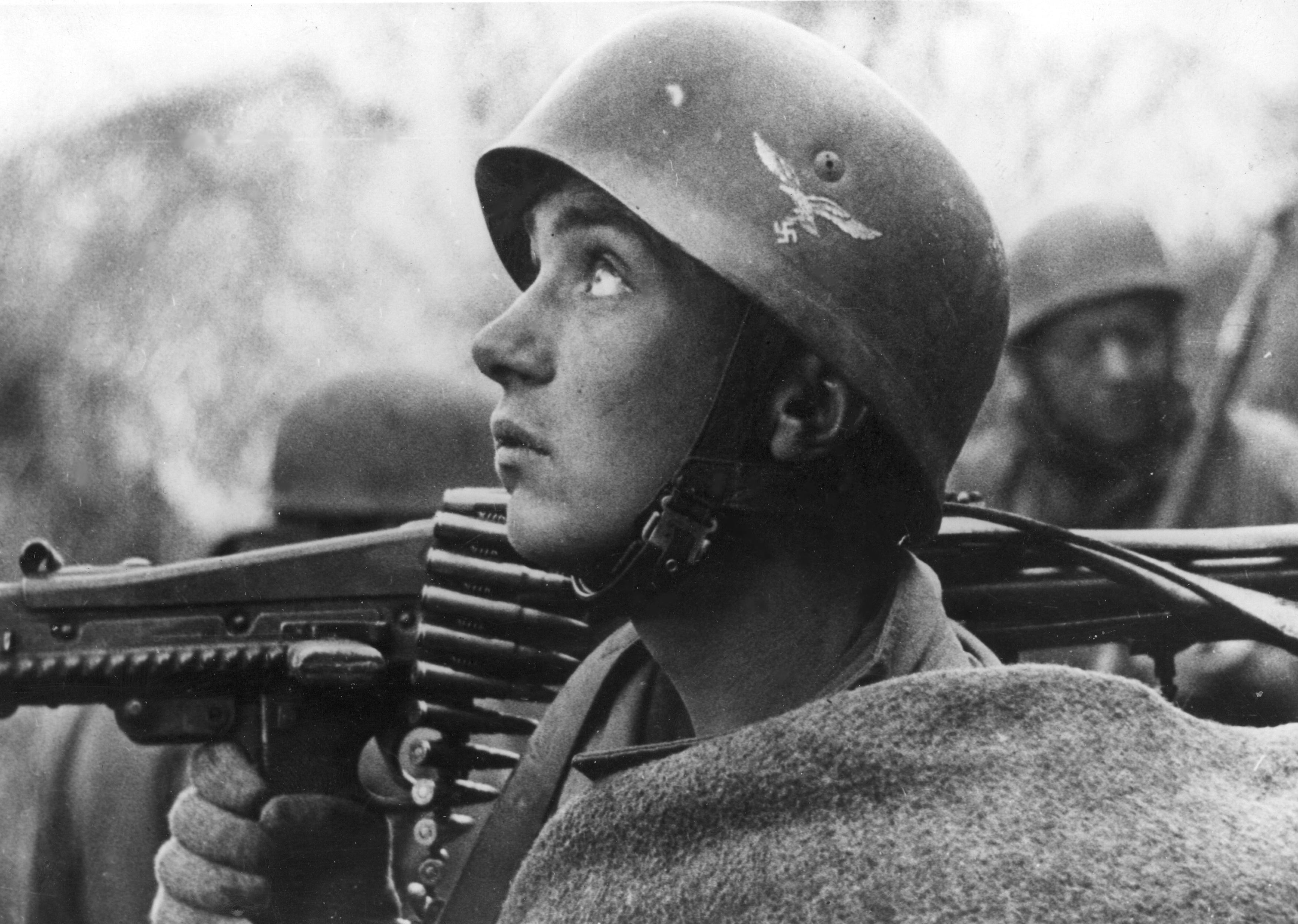 Niemiecki spadochroniarz z 4. FJD z karabinem maszynowym MG 42 na froncie pod Nettuno - Anzio.